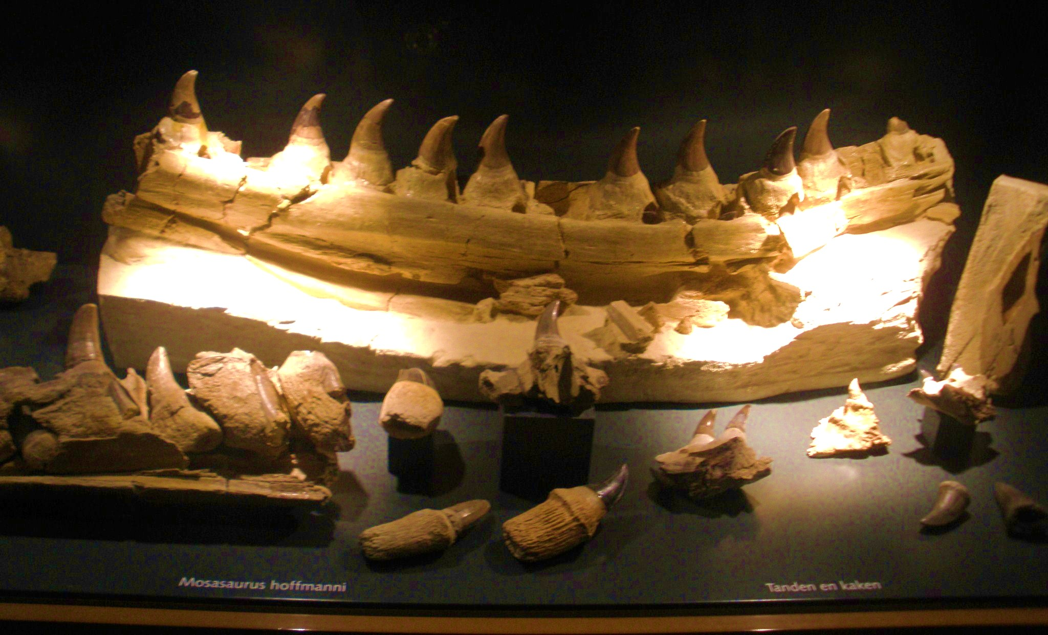 Fossil of Mosasaurus, an extinct mosasaur- Took the photo at Natural History Museum of Maastricht